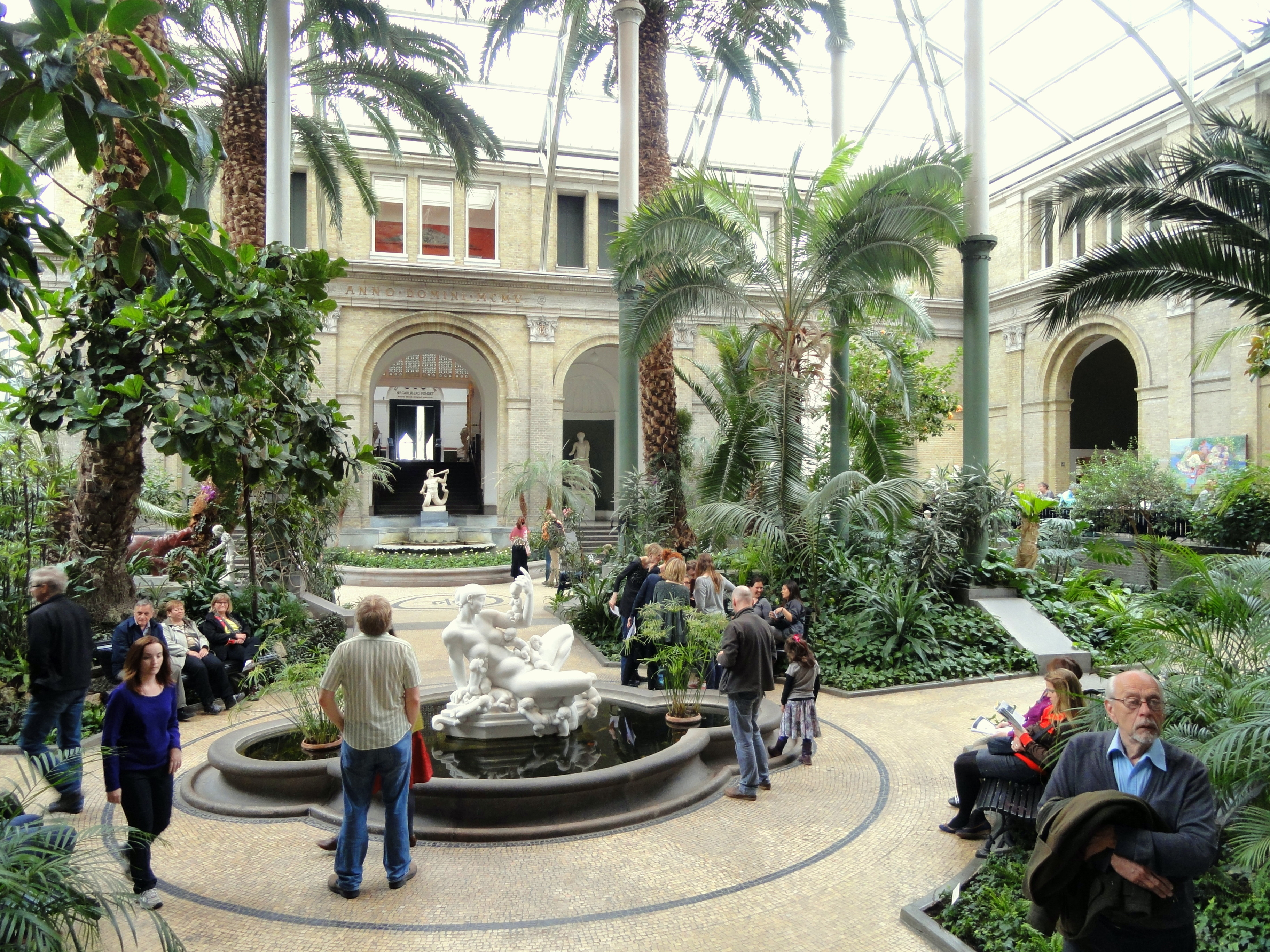 Interior of Ny Carlsberg Glyptotek, Dantes Plads 7, Copenhagen, Denmark.